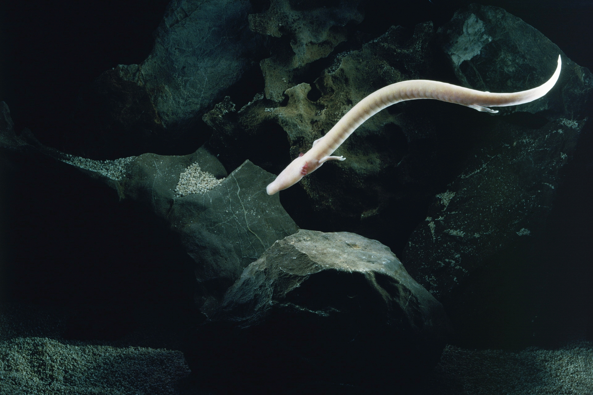 Olm (Proteus anguinus) in its natural habitat.